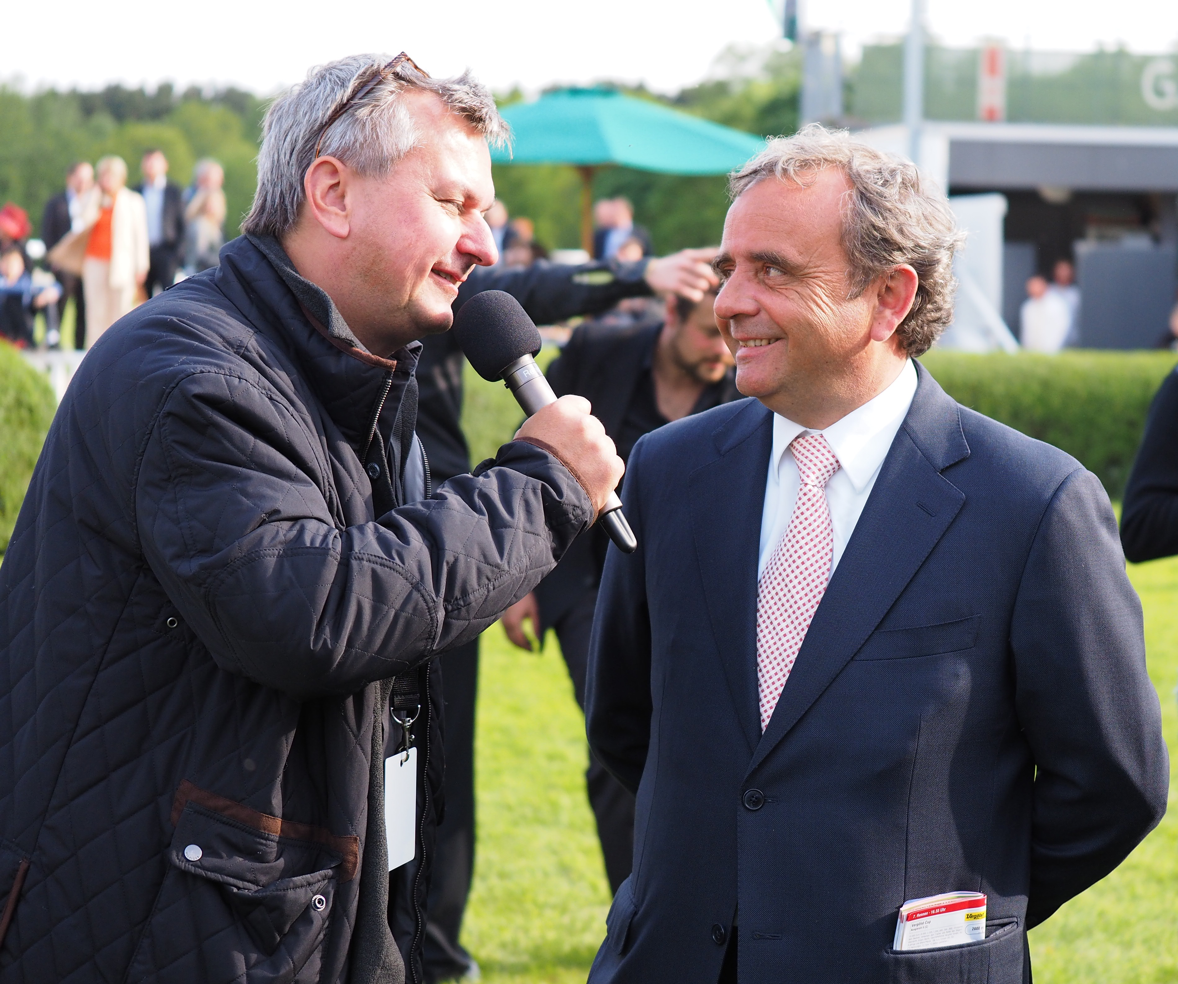 Andreas Wöhler (rechts) im Interview mit dem Journalisten Christoph Dannowski bei der Siegerehrung des Bavarian Classic Rennens auf der Neuen Bult